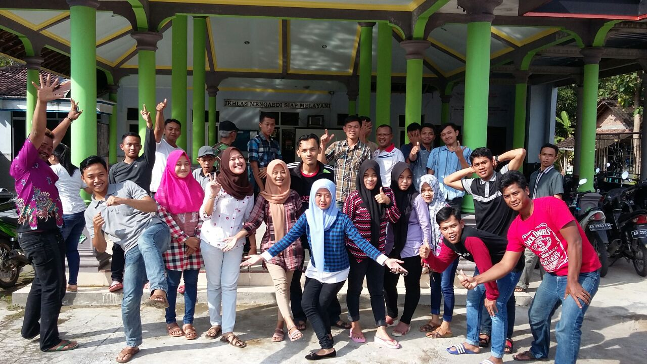 Pengurus Karang Taruna Pekab Desa Blagung